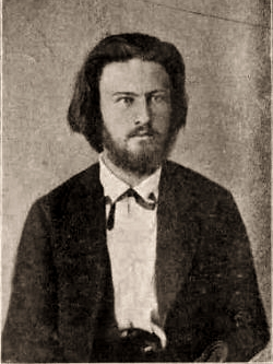 Nikolaj Ivanovič Kibal'čič